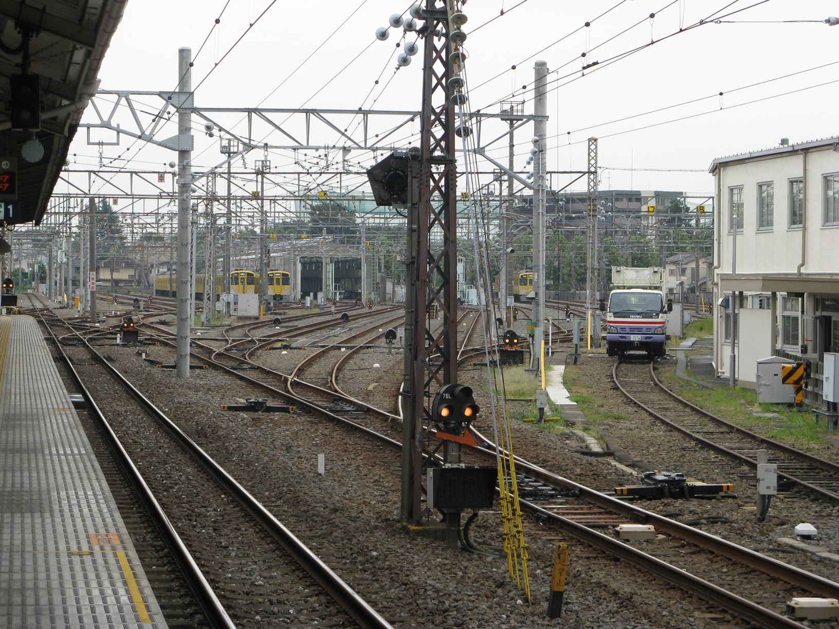 西武鉄道ja:上石神井車両基地 上石神井駅1番ホームから東望